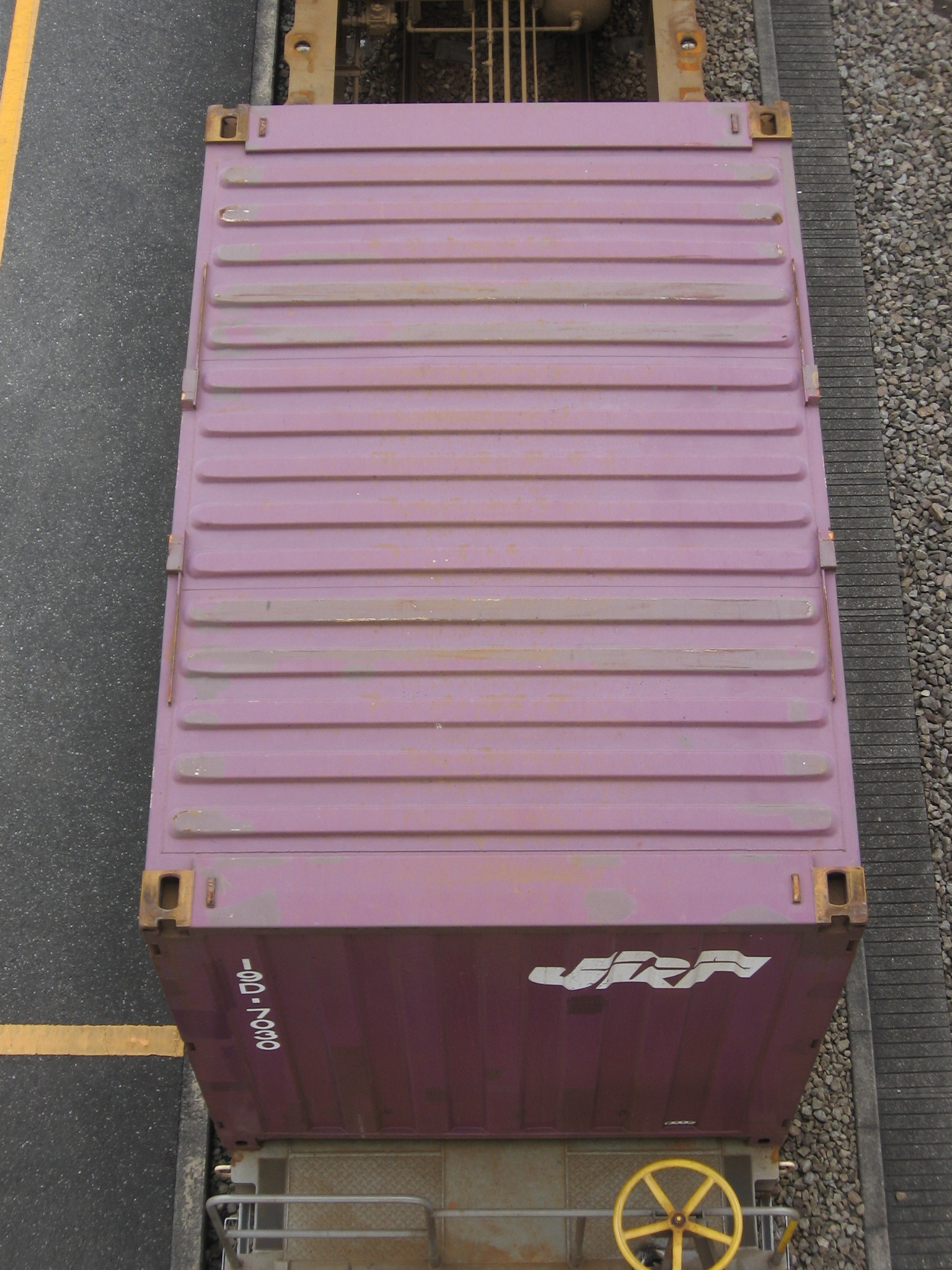 撮影地＝【埼玉／熊谷(タ)】